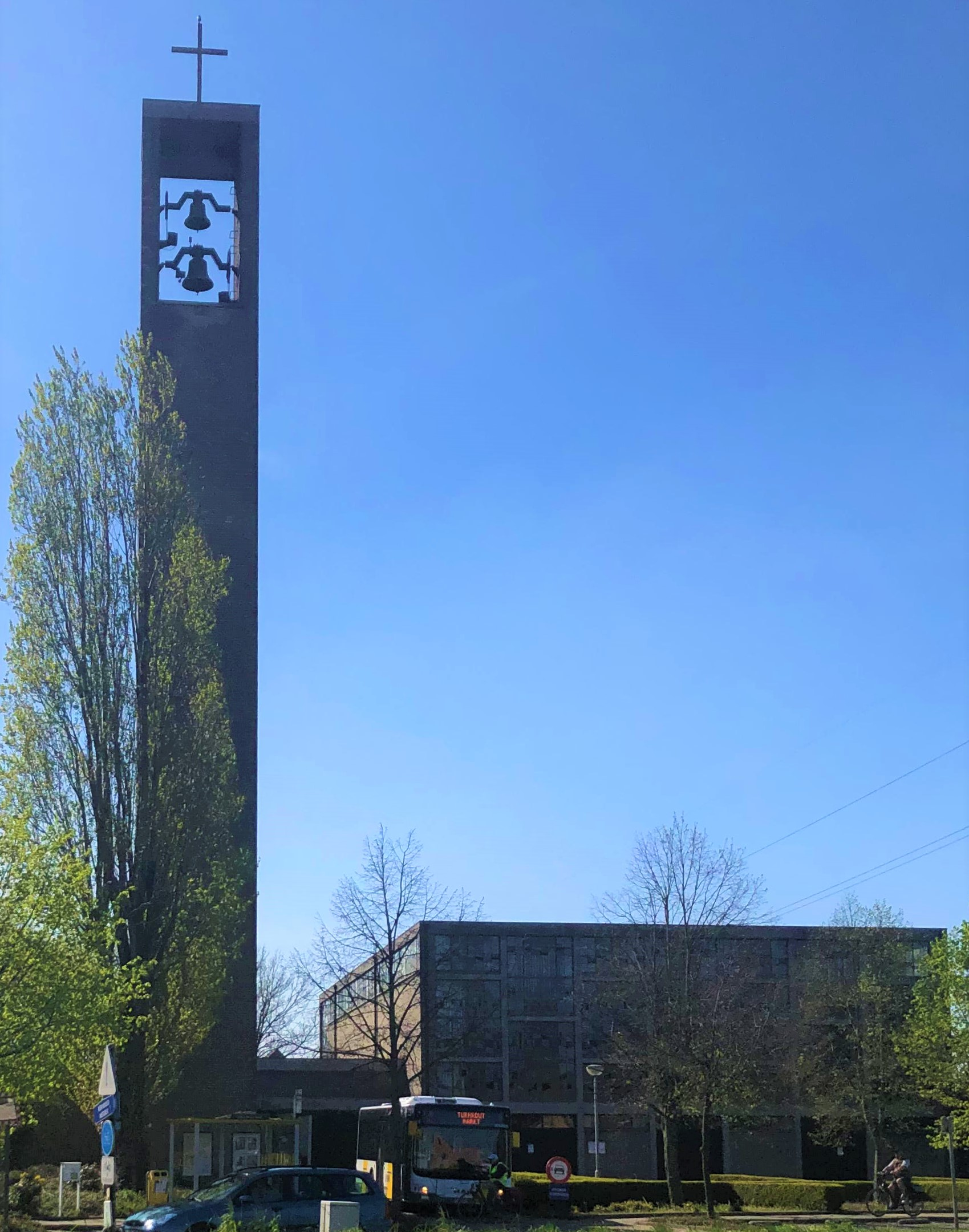 De parochiekerk en de klokkentoren